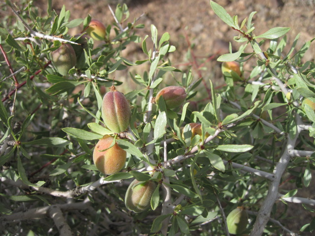 این عکس توسط احمد نیک گفتار از پوشش گیاهی ولایت ارغیان گرفته شده است و این درختچه معروف به بادام چاهی است .